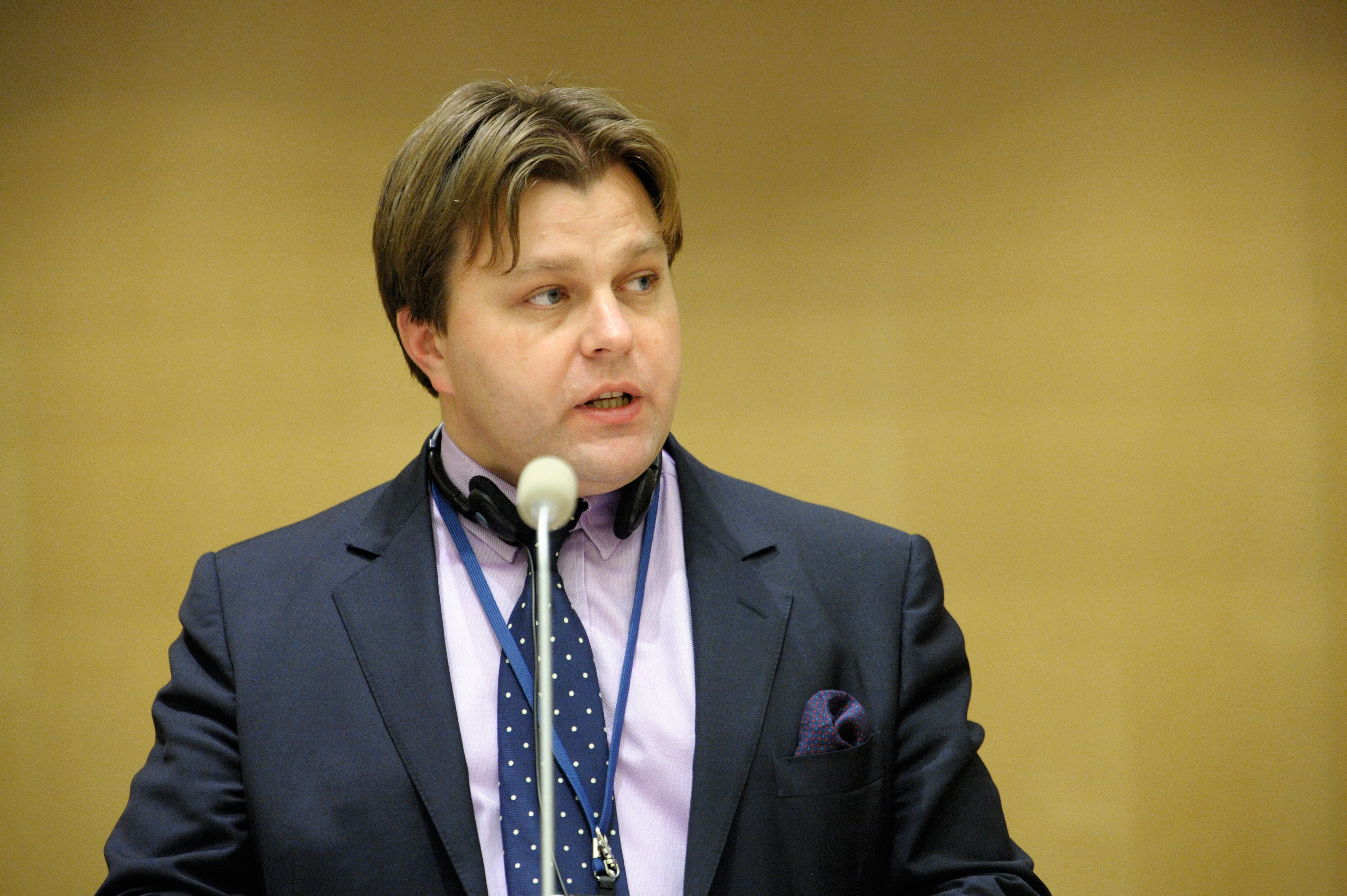 Ordföranden i Baltiska församlingen, Mantas Adomenas, håller tal under Nordiska rådets session i Stockholm 2009.